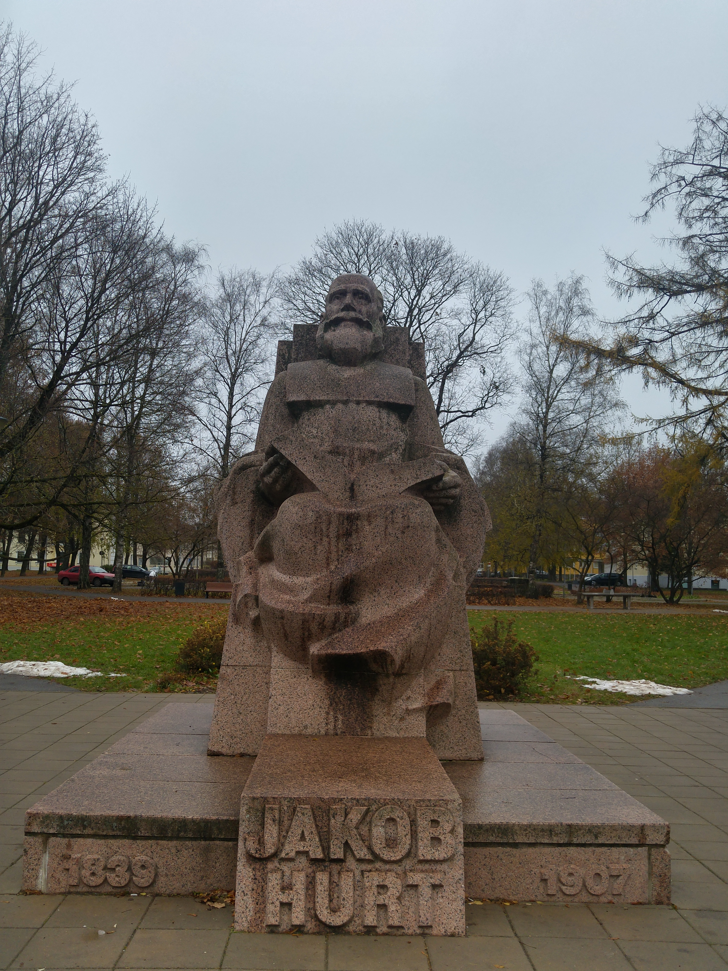 Pomnik Jakoba Hurta w Tartu